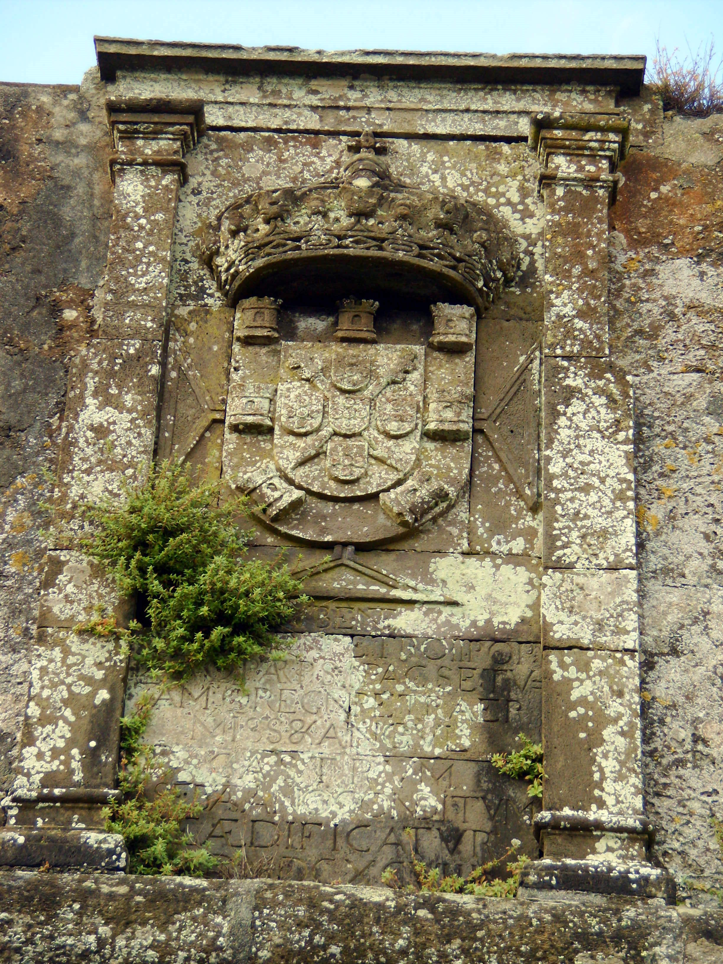 Forte de São Sebastião, freguesia de Nossa Senhora da Conceição, cidade e concelho de Angra do Heroísmo, ilha Terceira, Açores: detalhe da pedra de Armas.